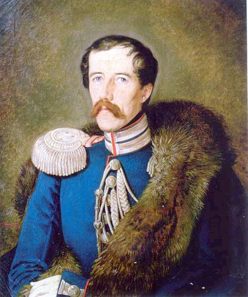 Мазер, Карл Петер. (Mazer, Karl Peter). 1807-1884 Портрет подполковника корпуса жандармов П.И. Мордвинова. 1842 Холст, масло.74х60. Ж-499 Слева внизу: C. P. Mazer. 1842 Пост. в 1909 по духовному завещанию В.П. Мордвинова (Санкт-Петербург)